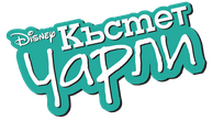 Лого на Късмет Чарли на български език